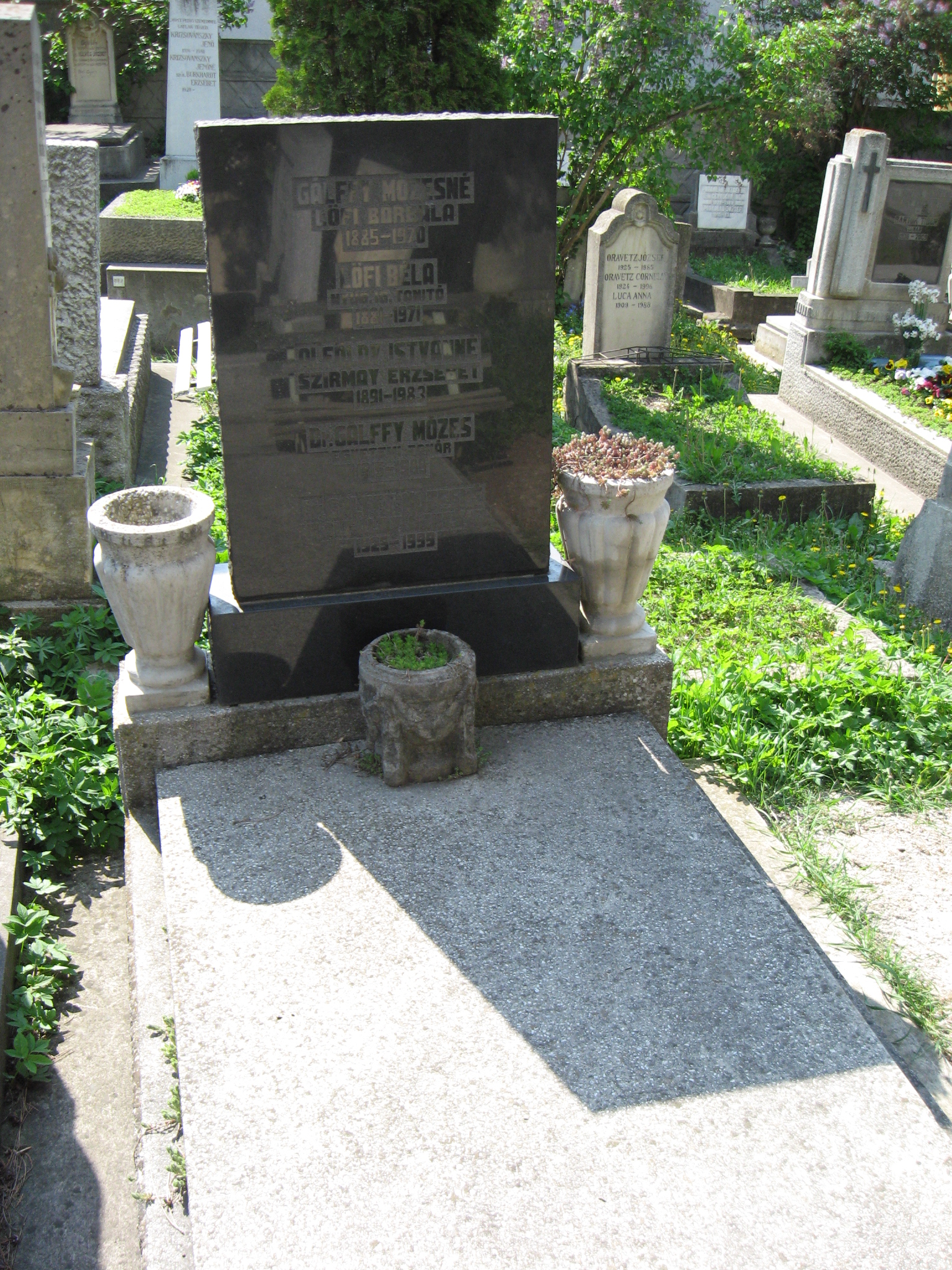 Gálffy Mózes sírja a kolozsvári Házsongárdi temetőben.